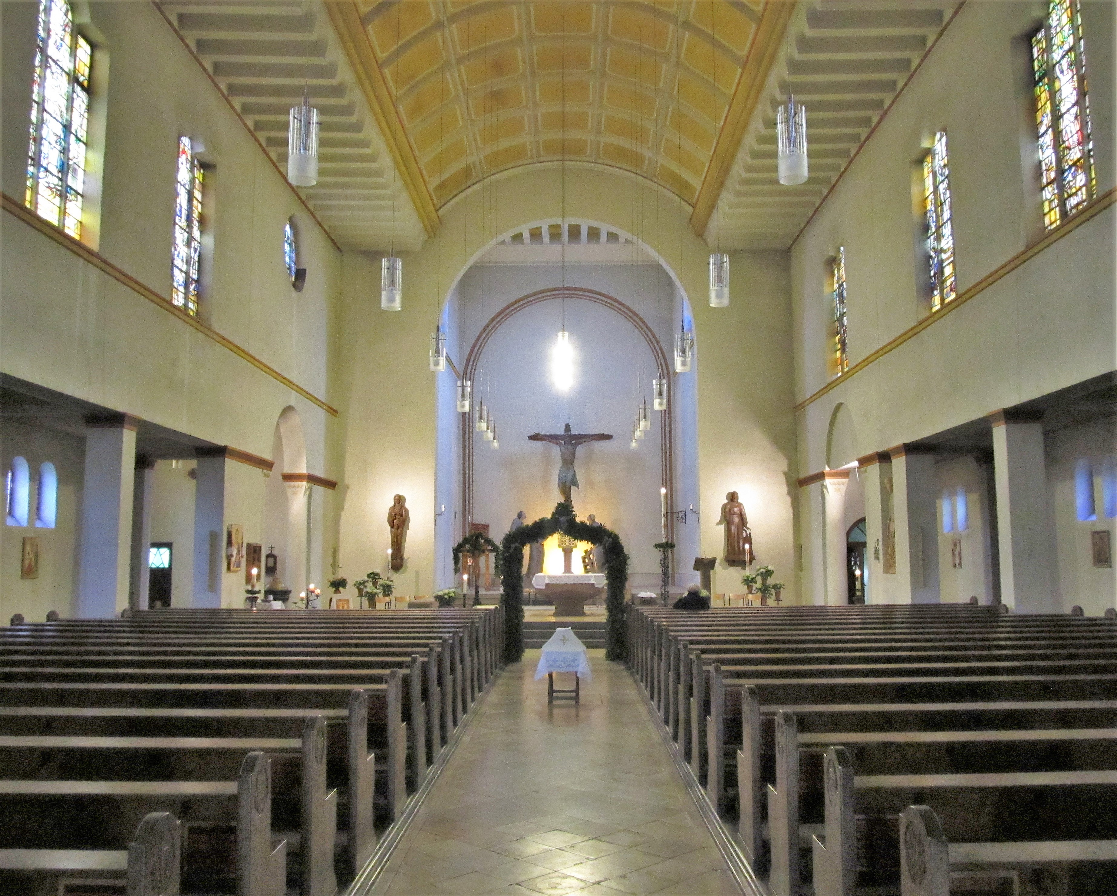 Blick ins Innere der katholischen Pfarrkirche St. Laurentius in Heiligenwald, einem Ortsteil der Gemeinde Schiffweiler, Landkreis Neunkirchen, Saarland